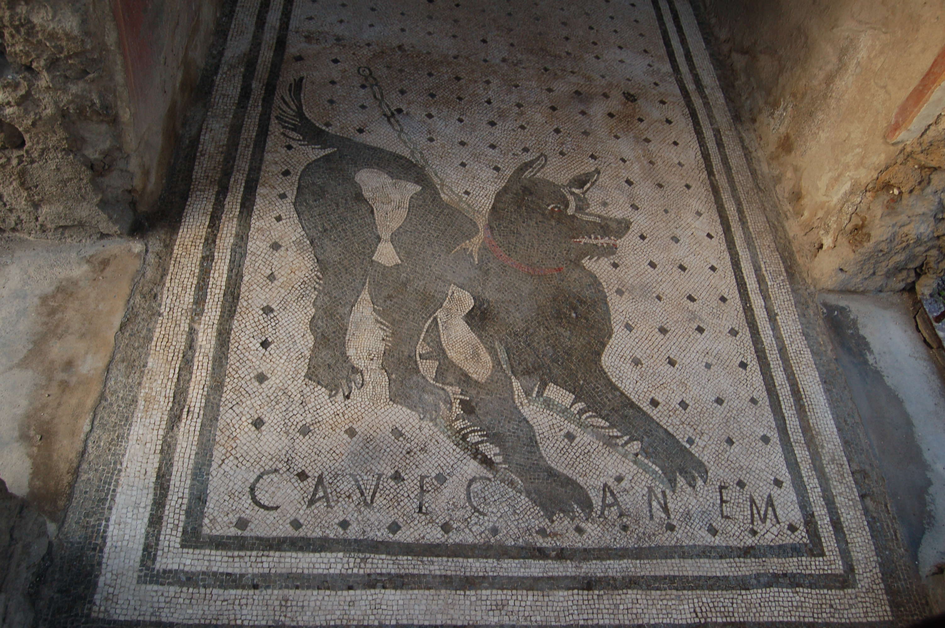 Mosaico en la puerta de entrada a la casa denominada "del poeta trágico" en la ciudad de Pompeya